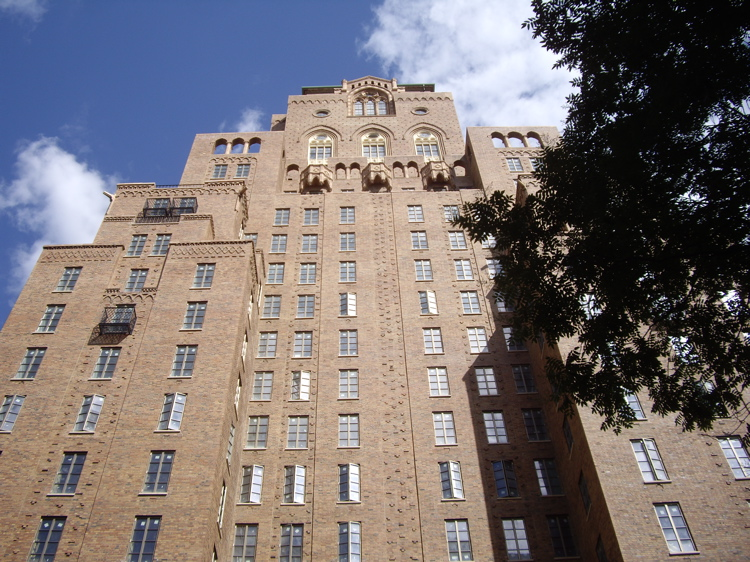 Barbizon Hotel for Women - 2007